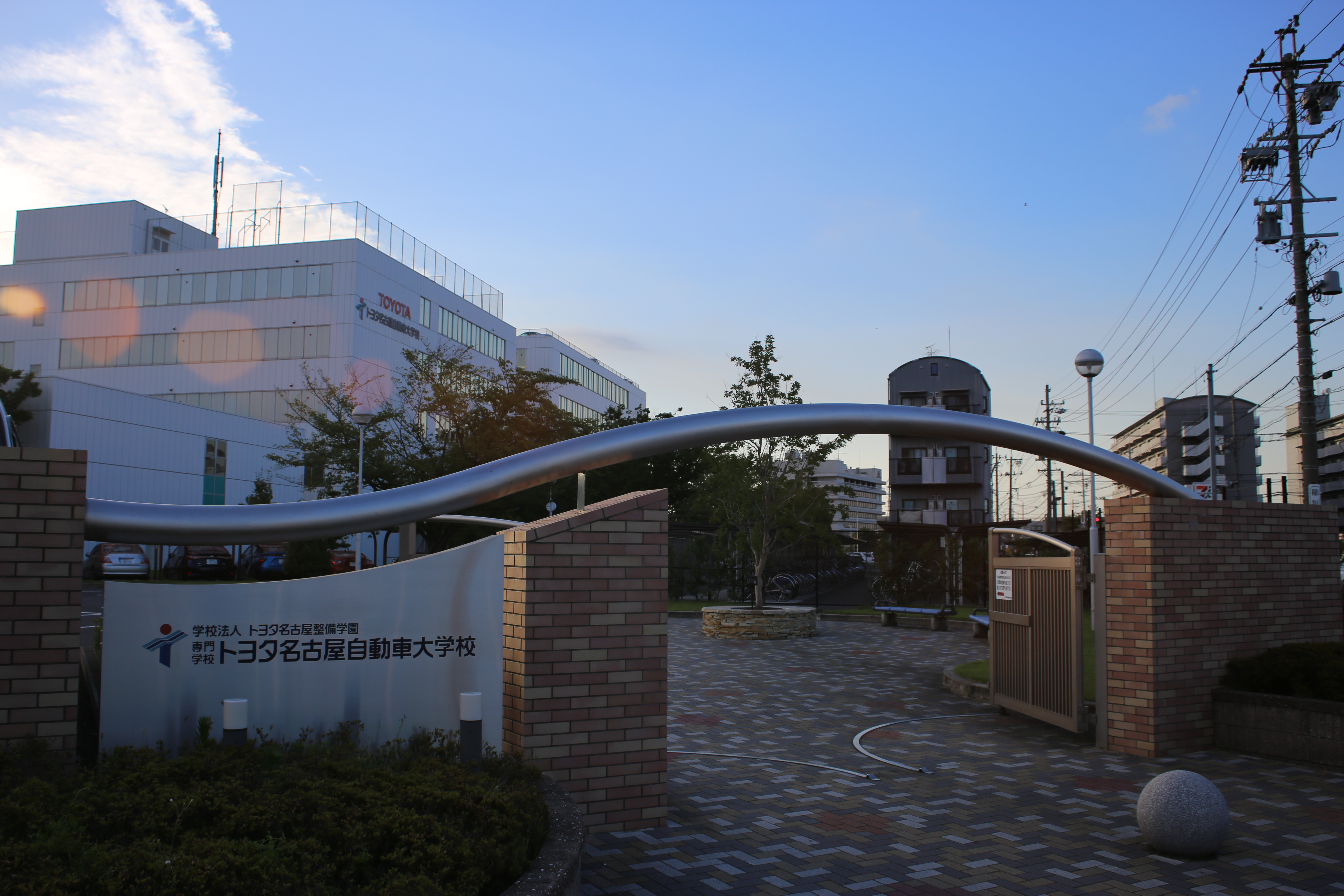 愛知県清須市春日一番割のトヨタ名古屋自動車大学校を南側公道東側より撮影